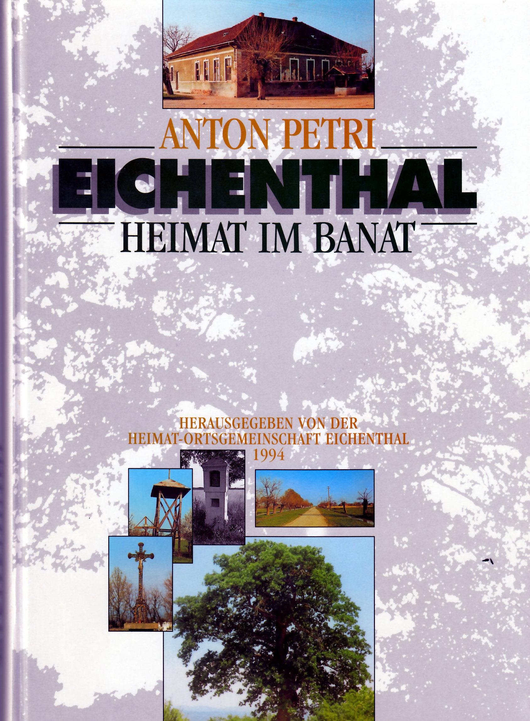 Buchdeckel vom Eichenthaler Heimatbuch "Eichenthal. Heimat im Banat. Geschichte einer deutschen Banater Kleingemeinde von der Gründung bis zum Niedergang" des Lehrers Anton Petri